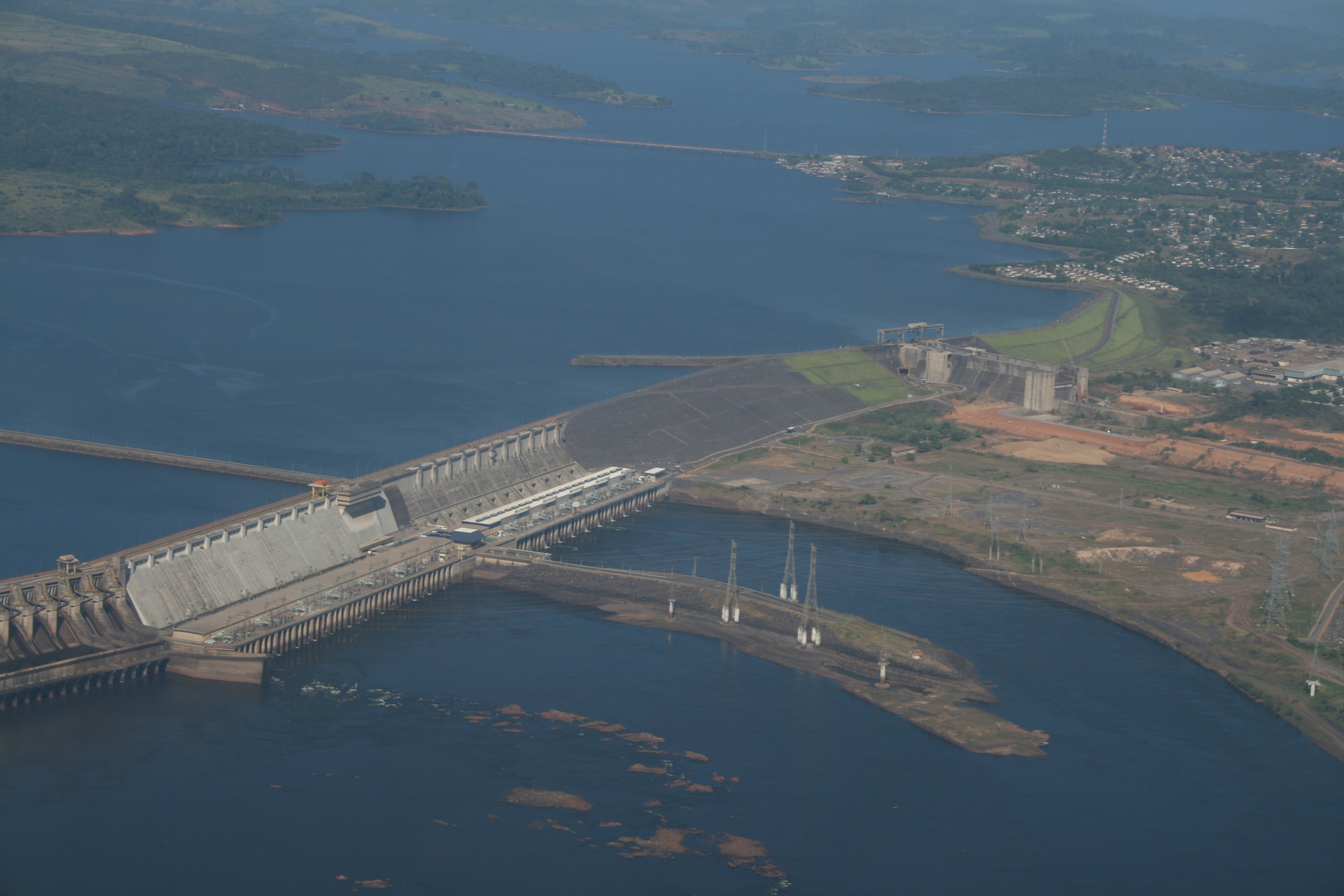 Vista aerea da represa de Tucuruí. Foto: Bruno Huberman